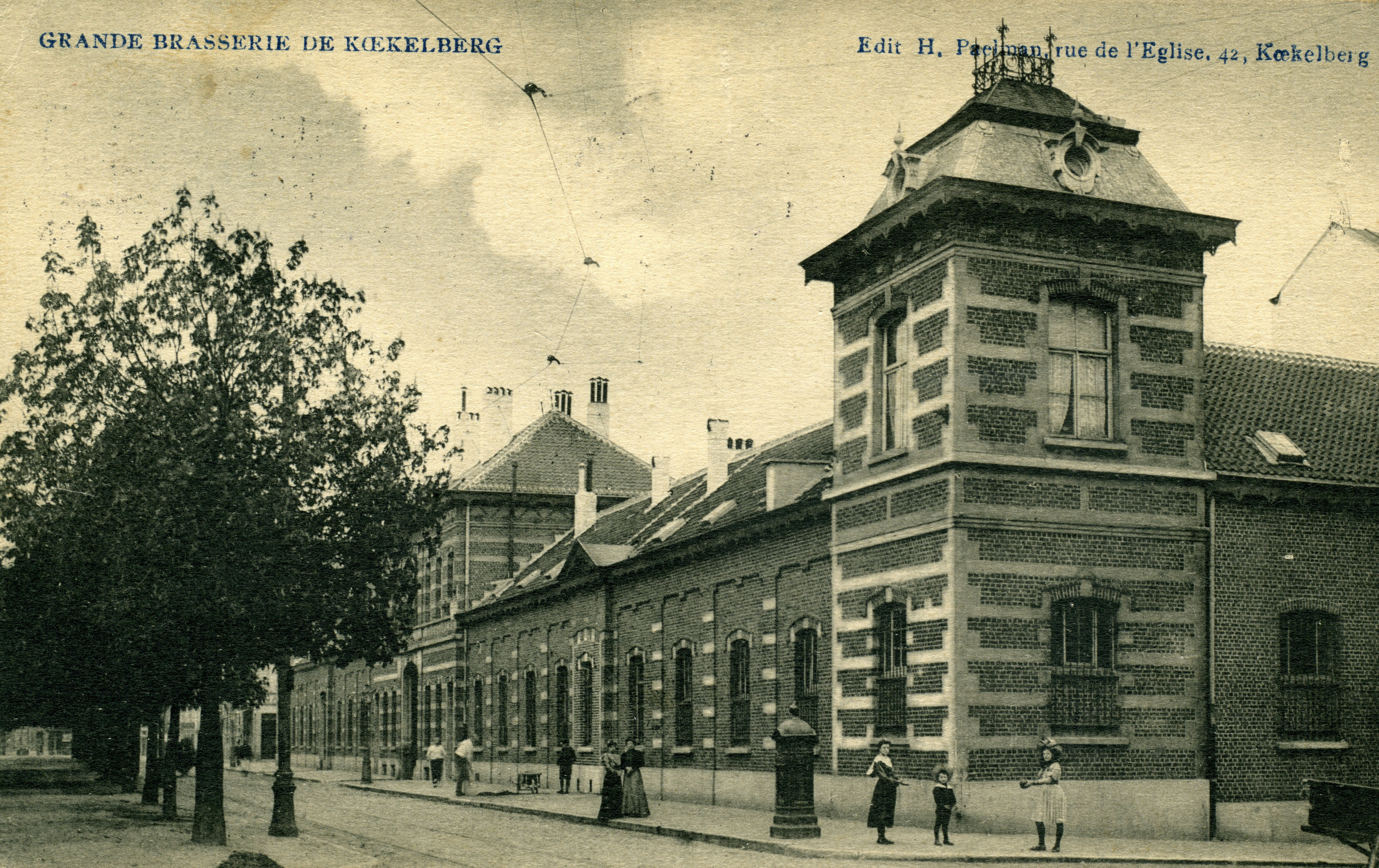 Grande Brasserie de Koekelberg, 17 avenue de la Liberté à Koekelberg. Angle rue des Braves.